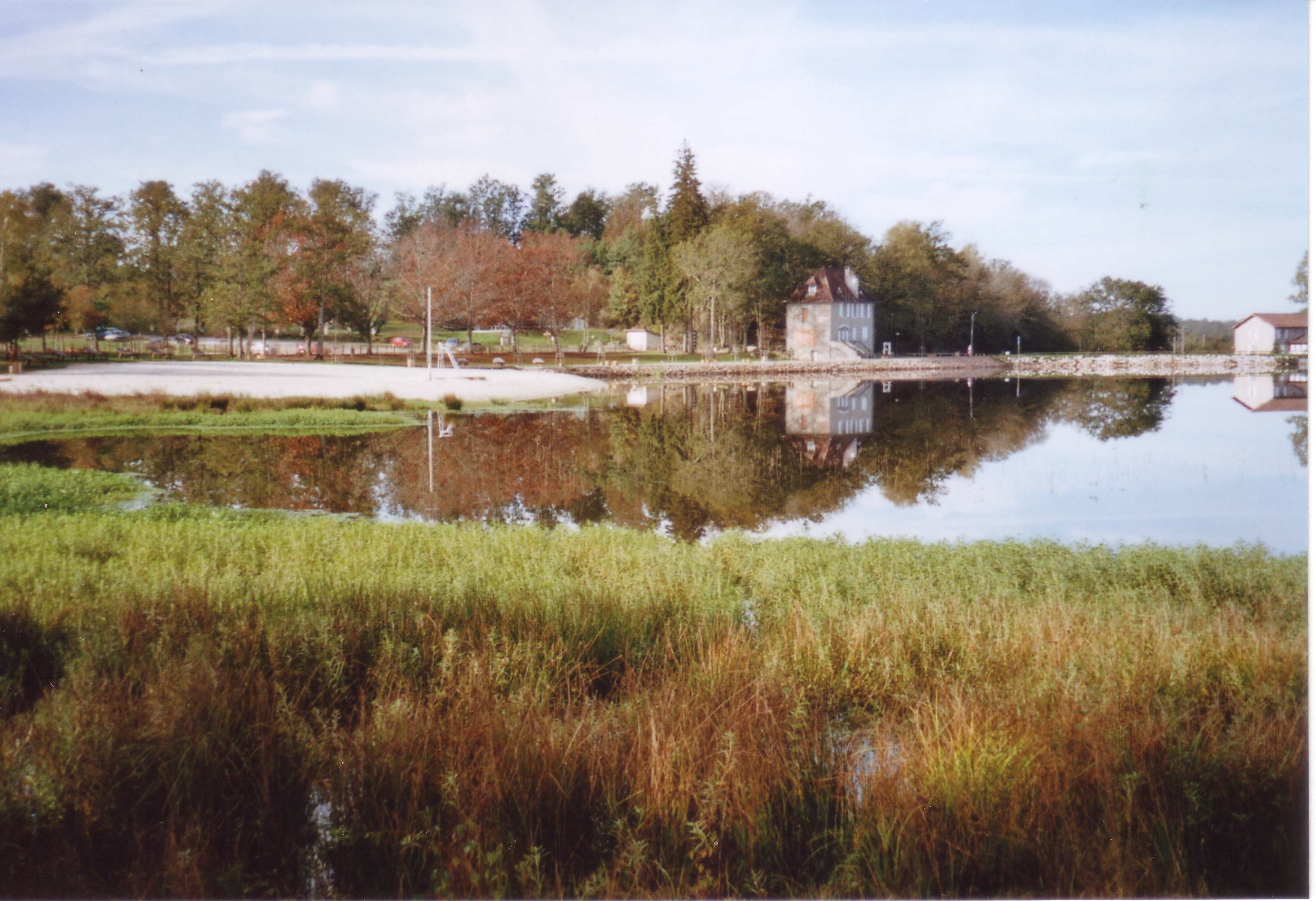 L'étang de Saint Estèphe dans le Périgord Vert (Dordogne, France) après le réaménagement en 2006.